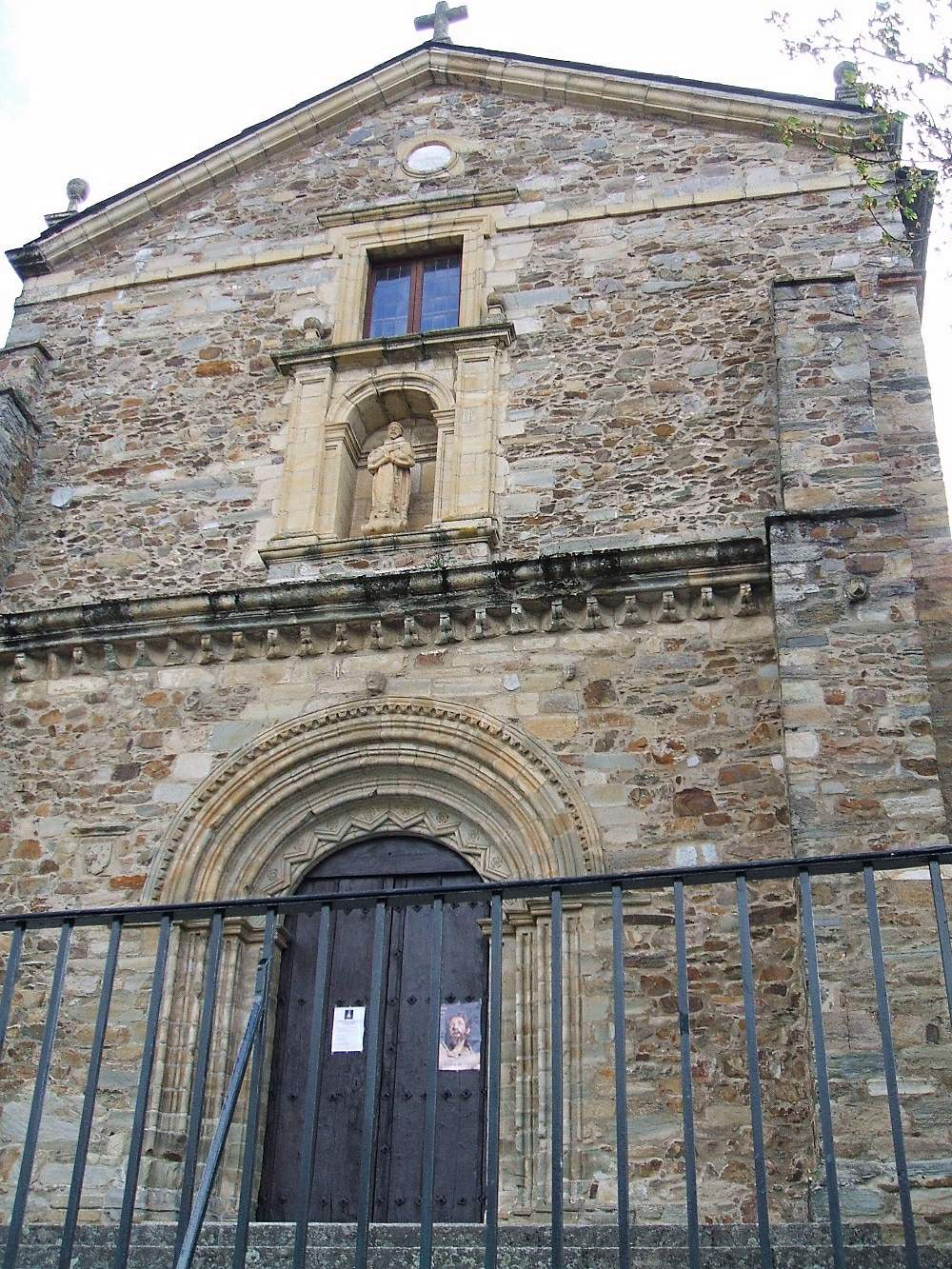 Villafranca del Bierzo - ex Convento de San Francisco